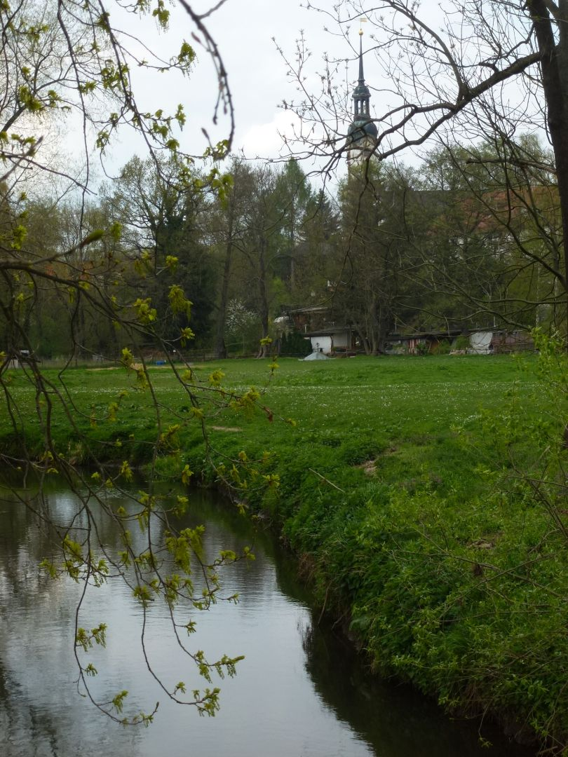 Wyhra in Zedtlitz